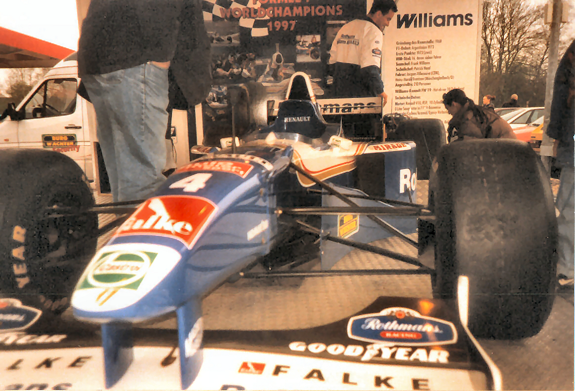 Williams F1 Nr. 4 der Saison 1997